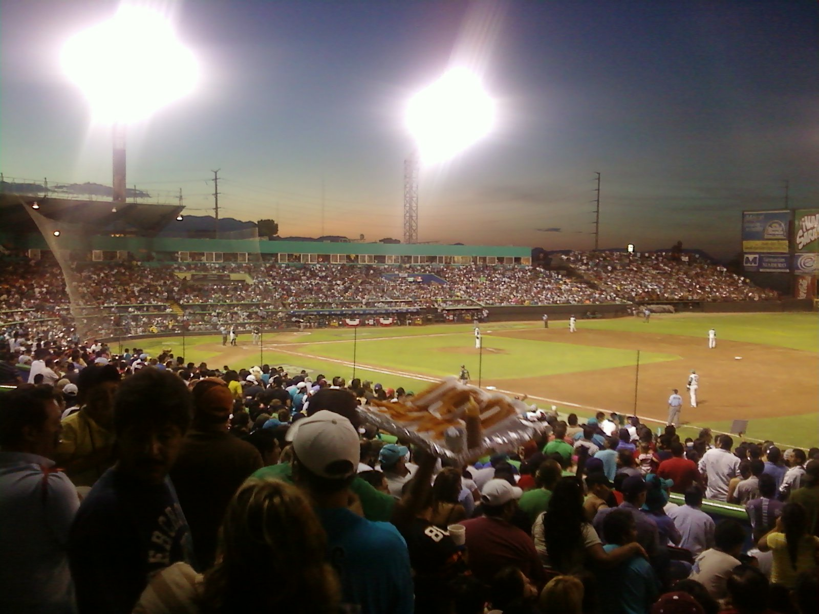 Estadio Fransisco I. Madero durante el 5º partido de la Serie Bicentenario entre Pericos de Puebla y Saraperos de Saltillo, realizado en Saltillo, Coah.